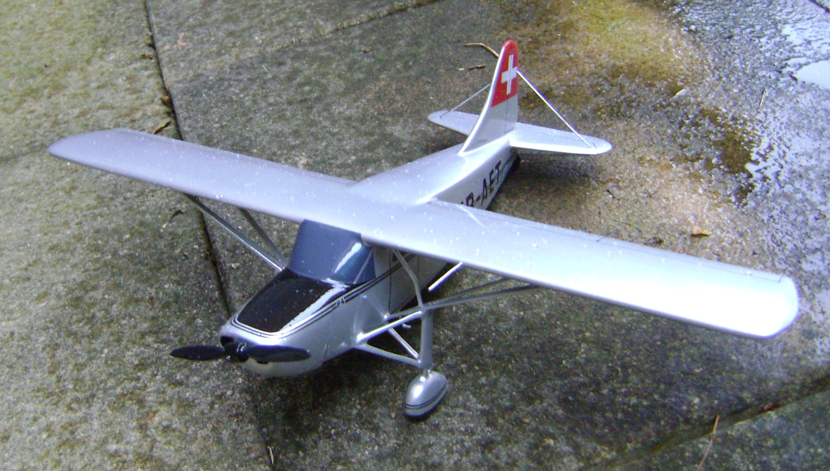 PilatusP4schräg